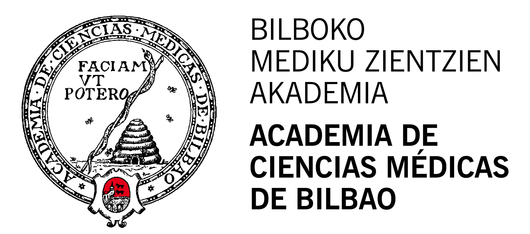 Escudo de la Academia de Ciencias Médicas de Bilbao con el lema 'faciam ut potero' (trad: "He hecho lo que he podido")